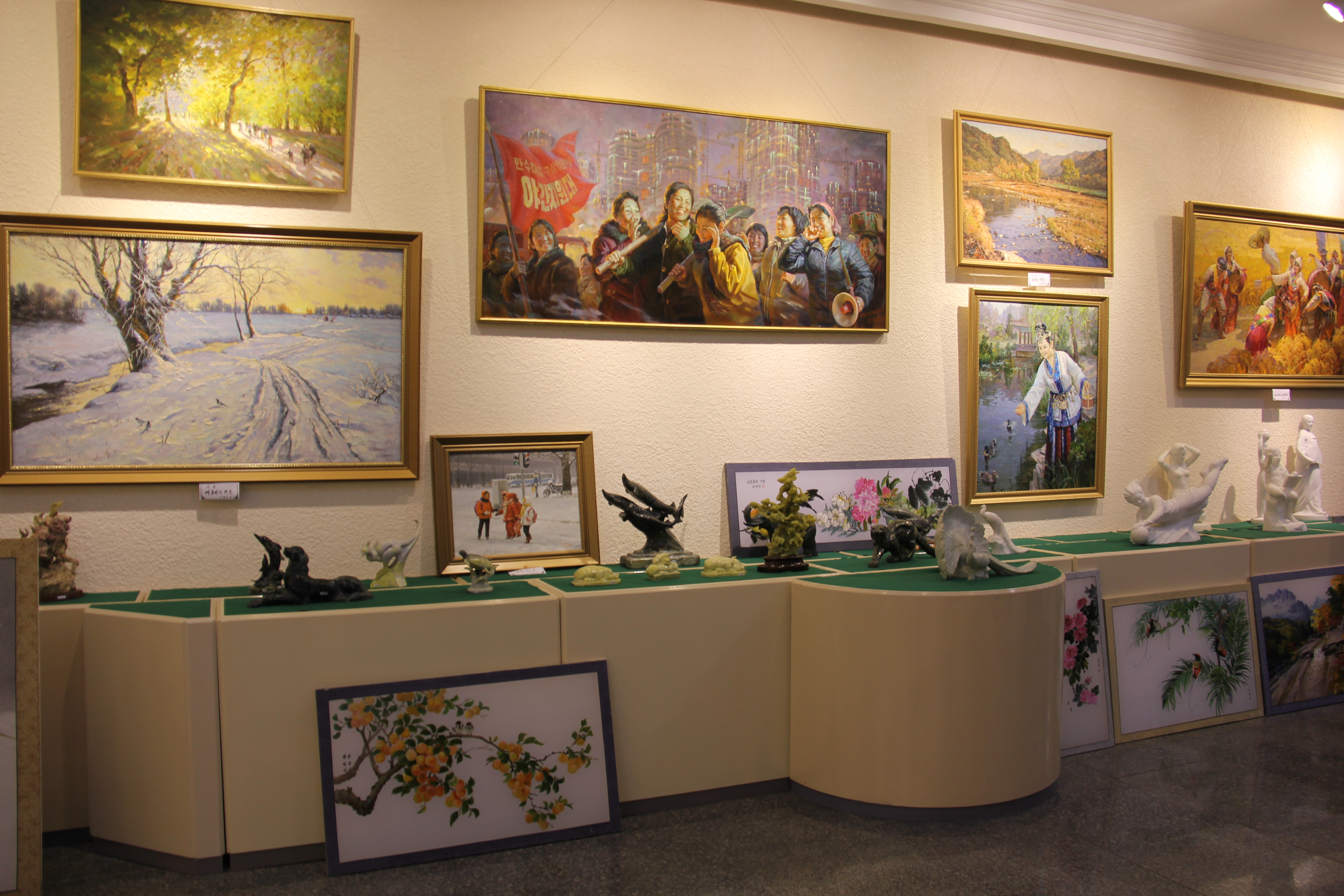 Mansudae Art Studio